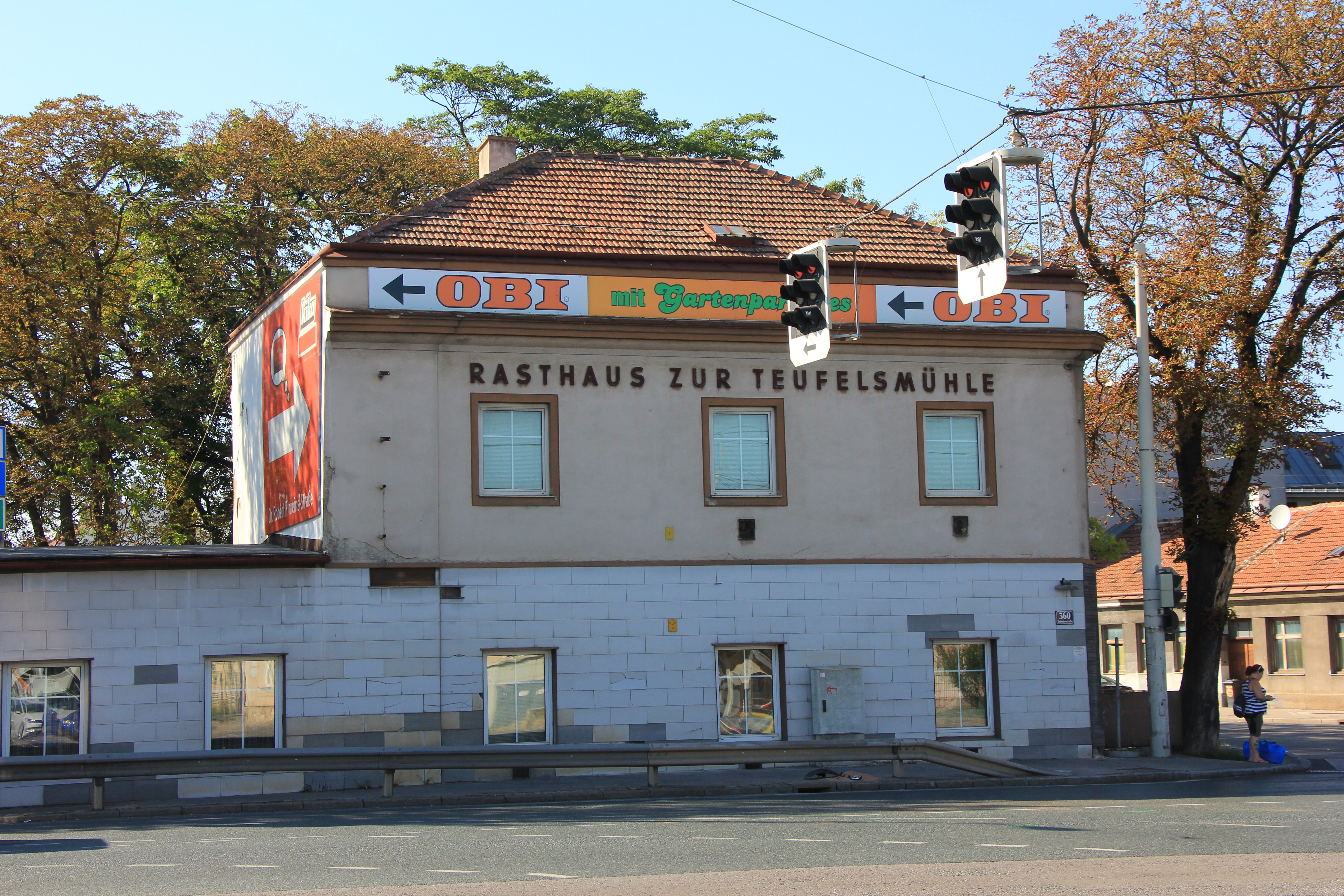 Ehemaliges Rasthaus Teufelsmühle an der Stadtgrenze von Wien